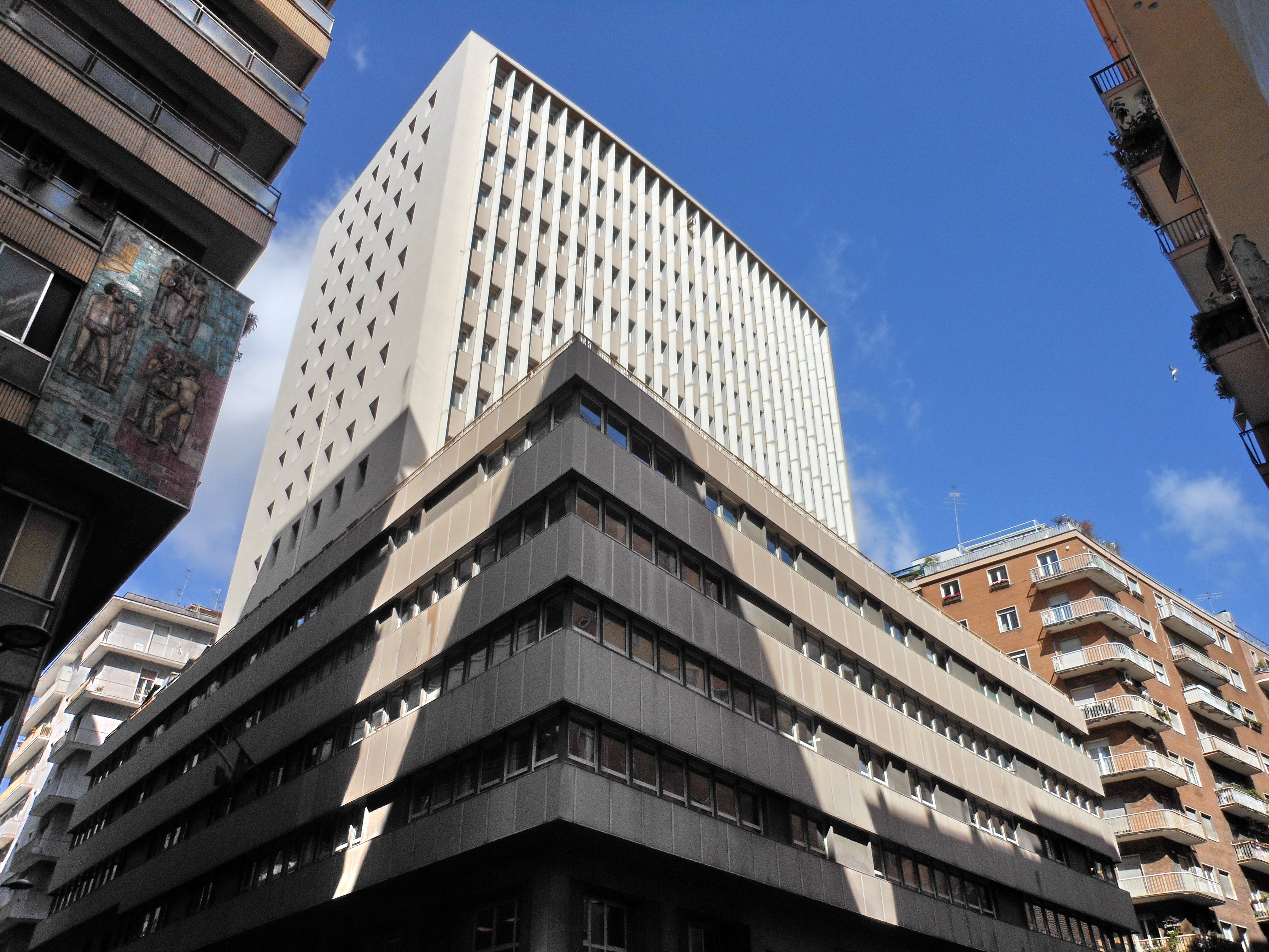 Palazzo SME-ENEL in via Roberto Bracco a Napoli